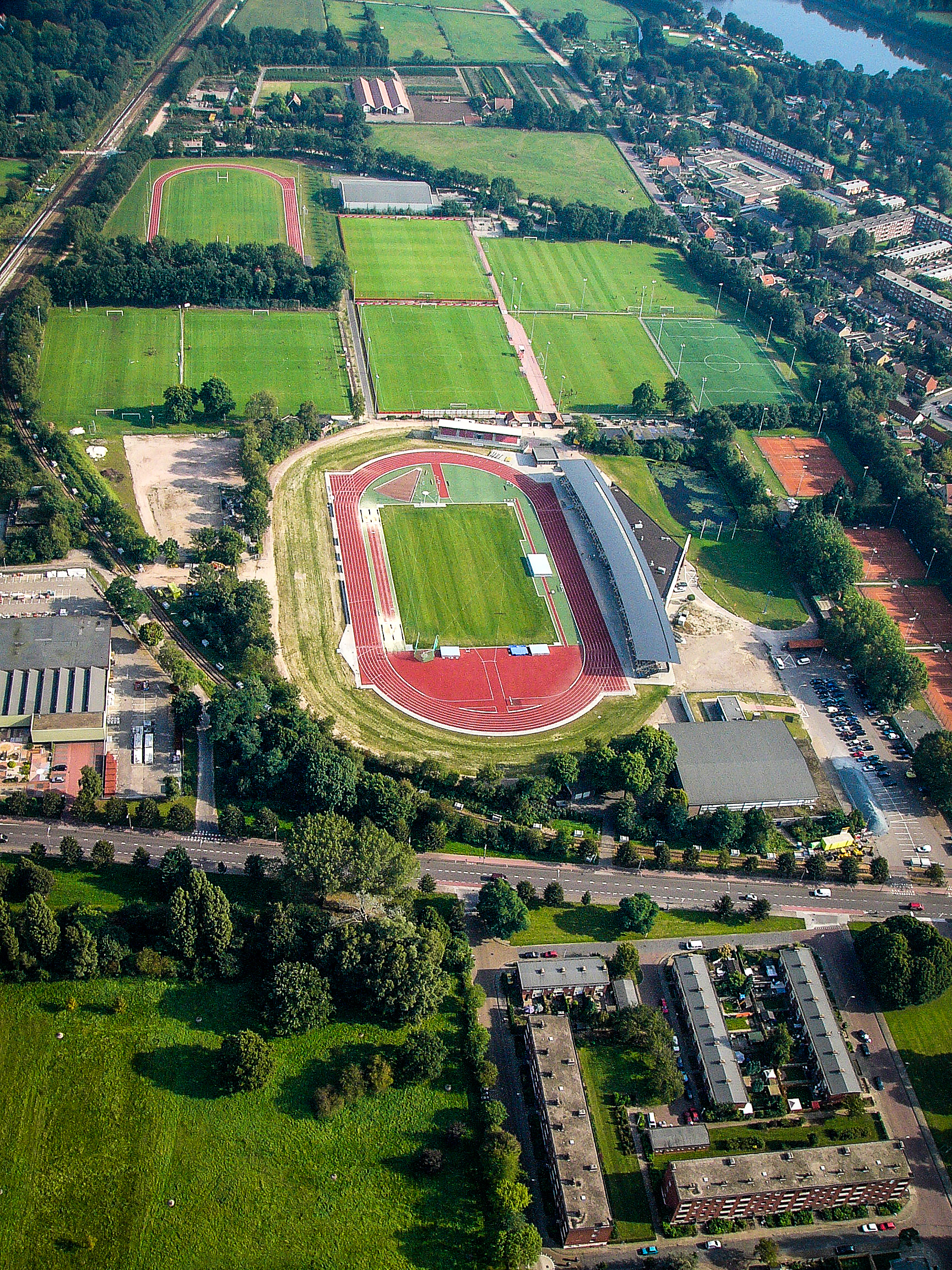 Sportpark Veldwijk vanuit de lucht